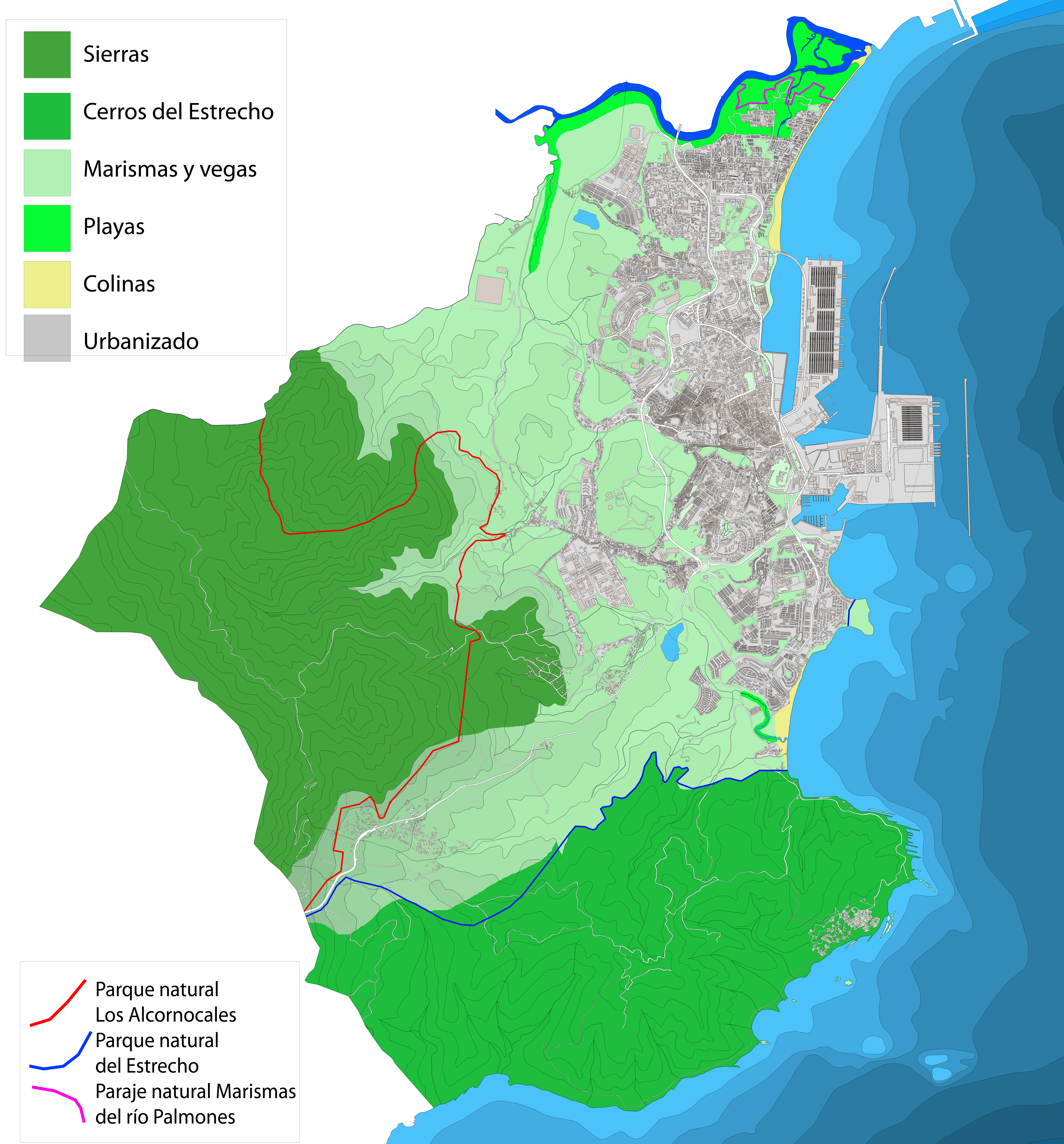 Mapa del término municipal de Algeciras indicando sus unidades de paisaje. Algeciras, Andalucía, España.